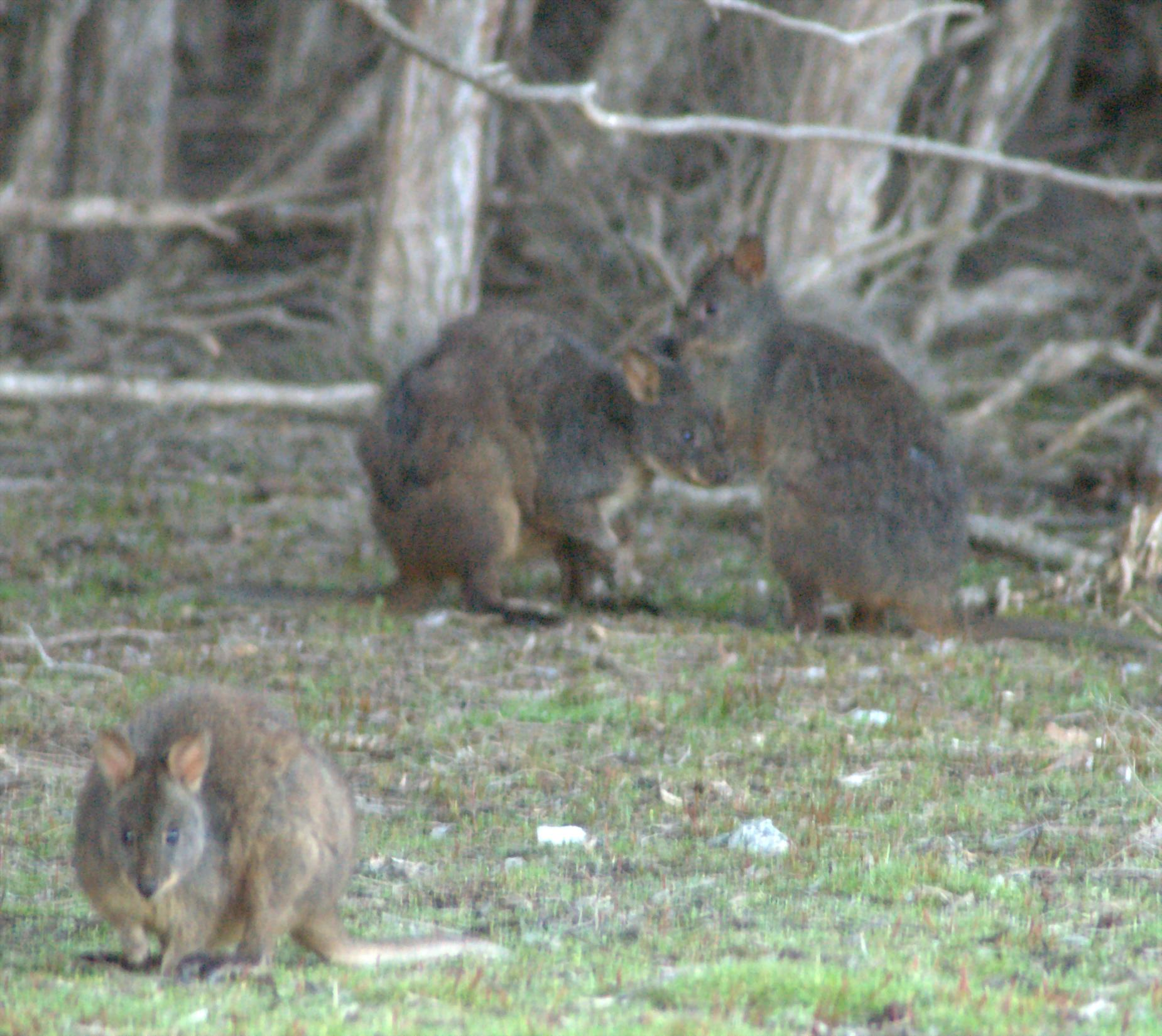 Тасманьскі падемелони. Пара на другому плані вступають у шлюб. Тасманія, Австралія